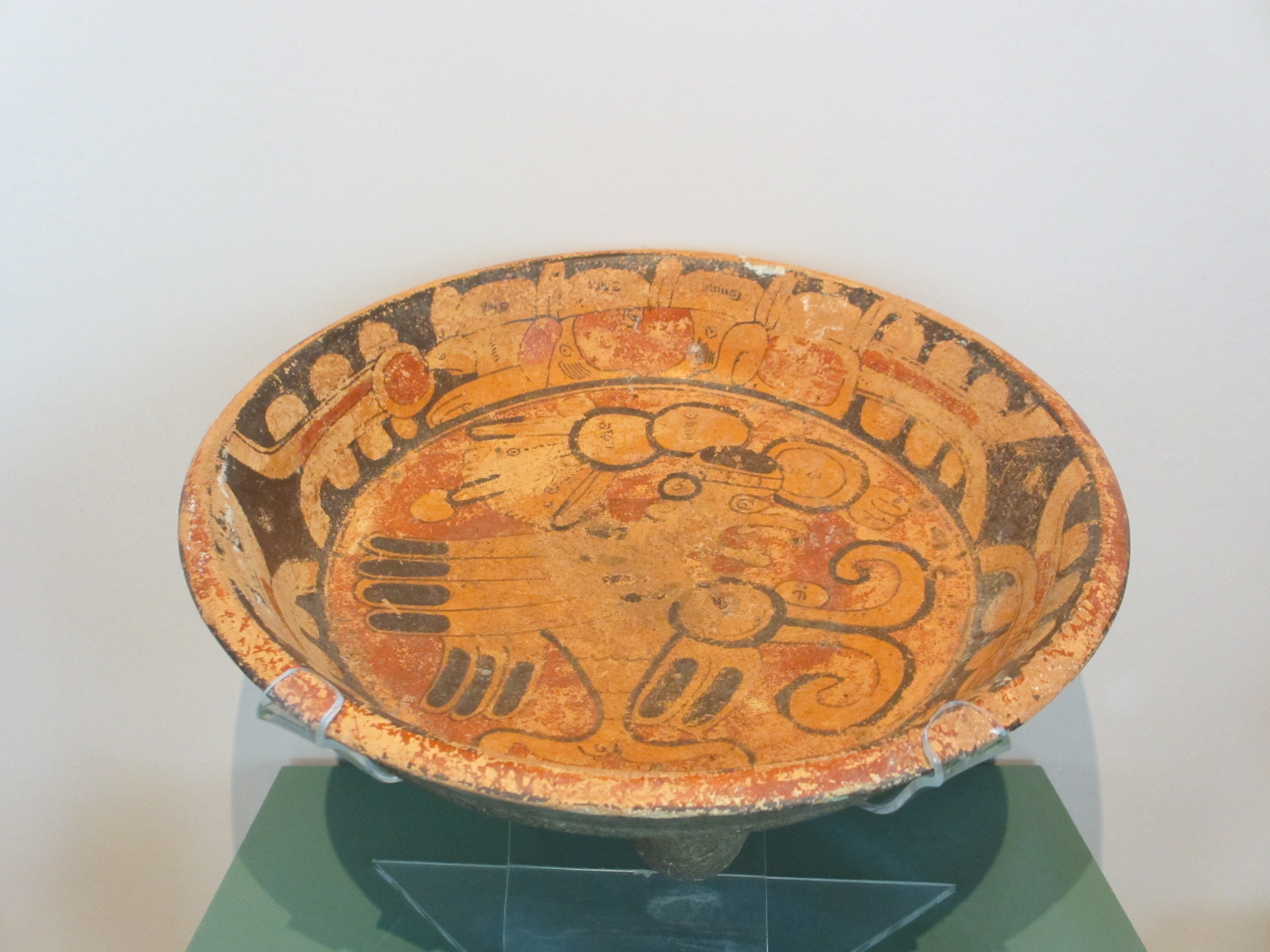 Plato decorado. Cultura maya.